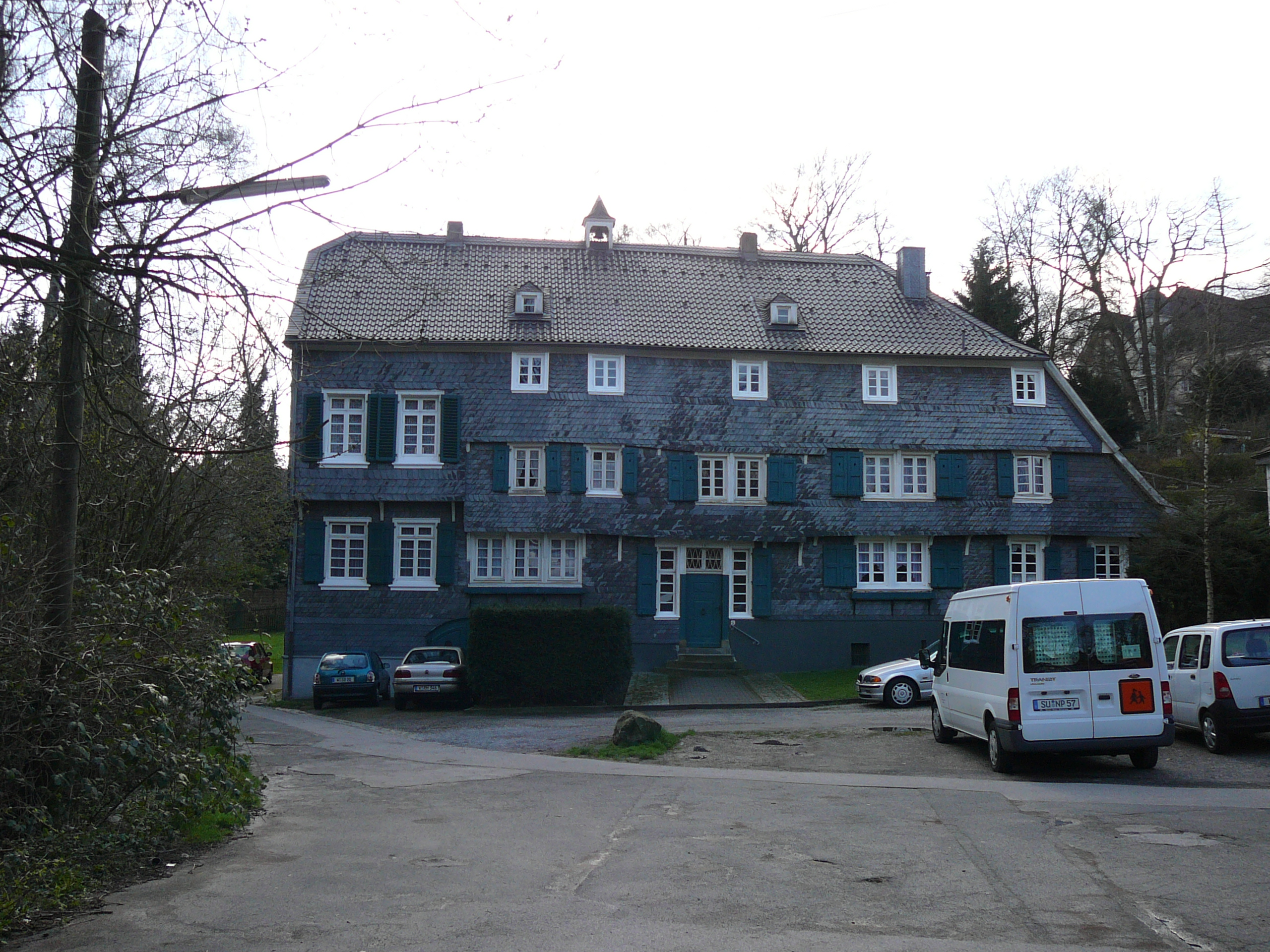 In der Mirke, Wuppertal